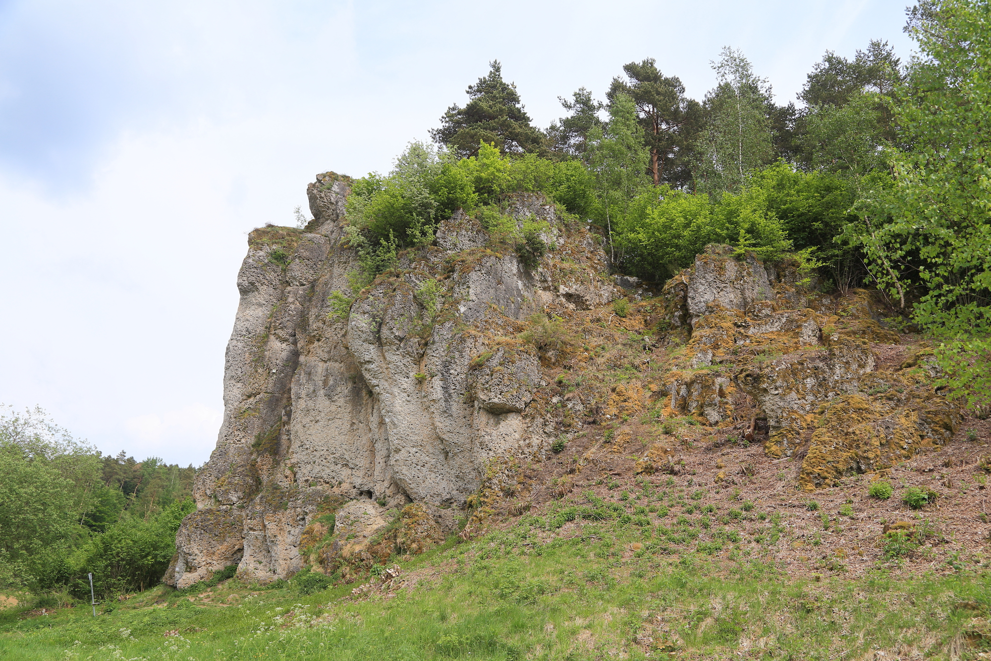 Frankendolomit, Oberer Jura